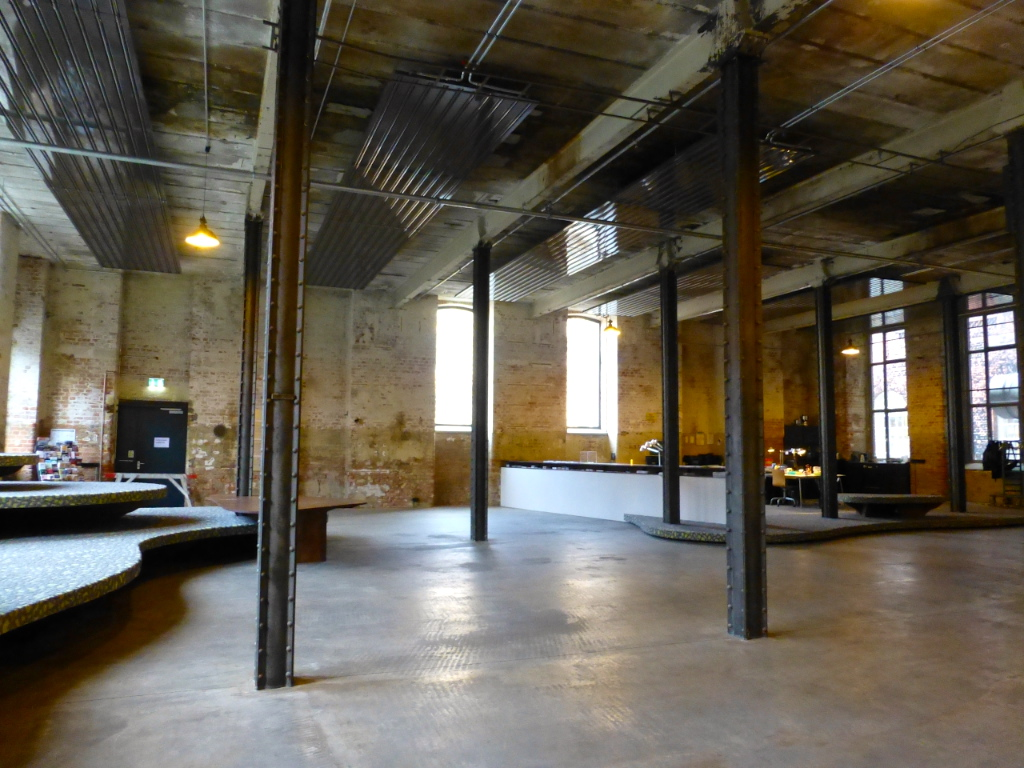 Halle 14 mit Informationsstand am 10. Januar 2015